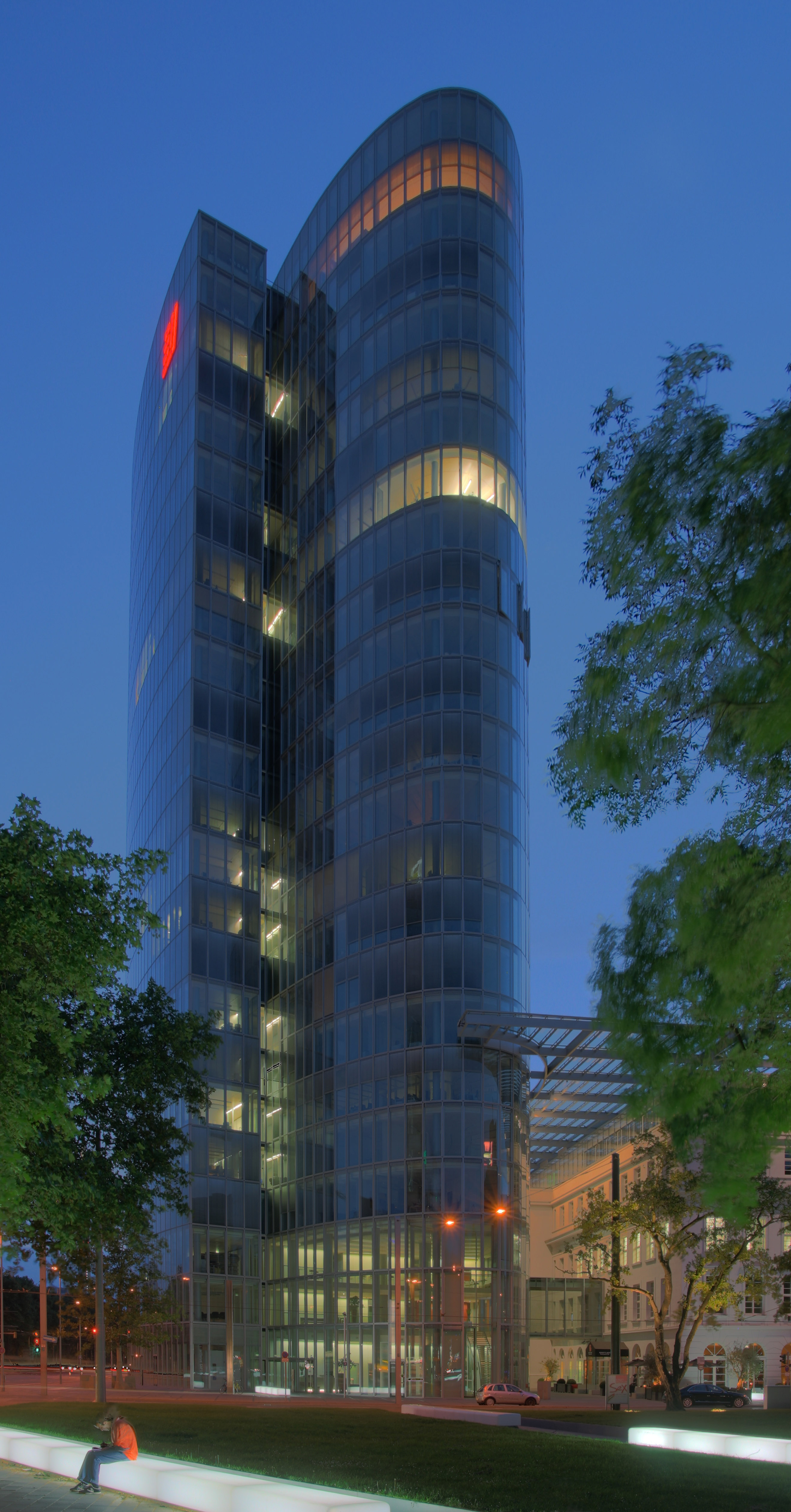 "GAP 15" building in Düsseldorf, Germany